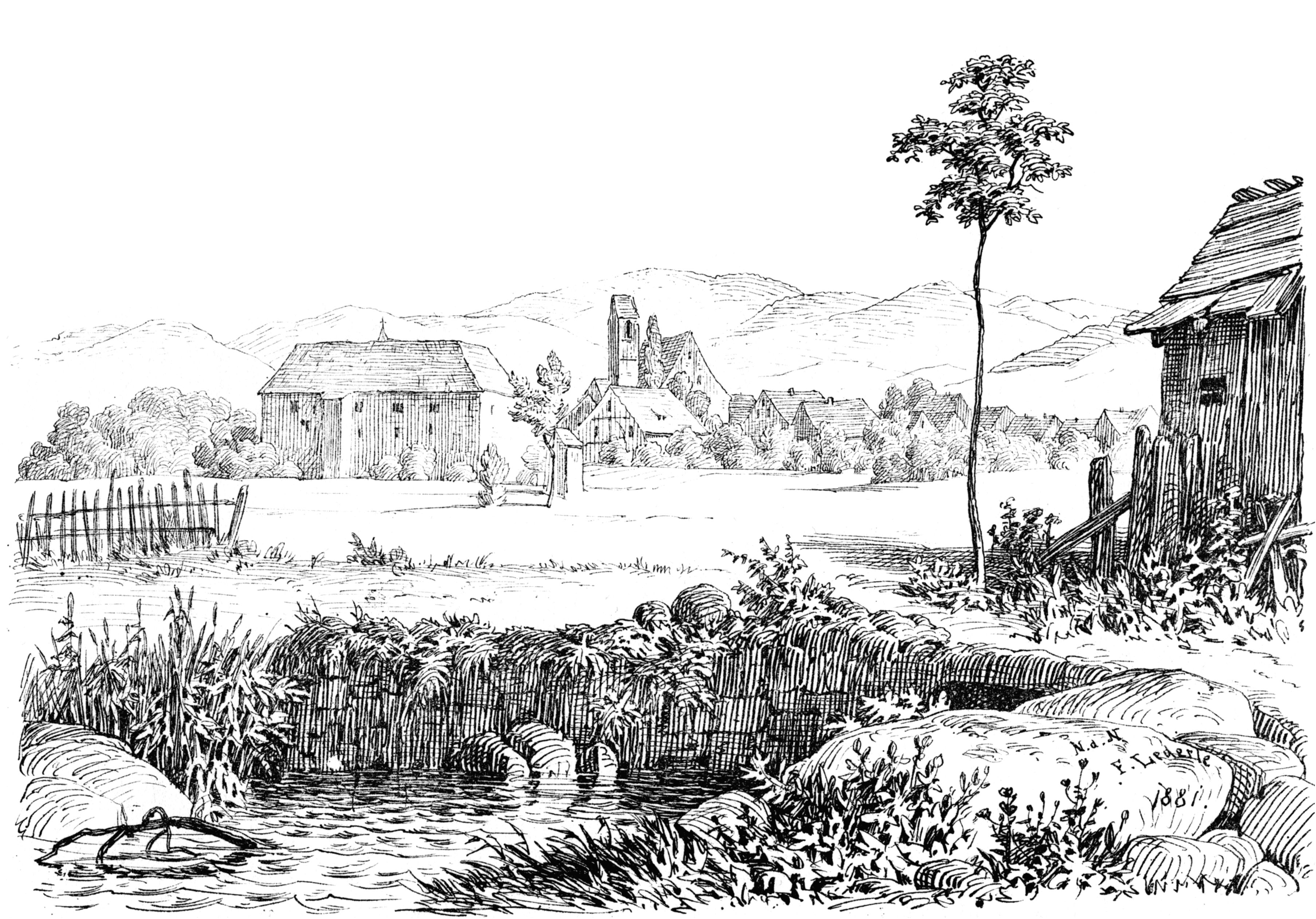 Pfarrkirche St. Gallus und Talvogtei in Kirchzarten 1880